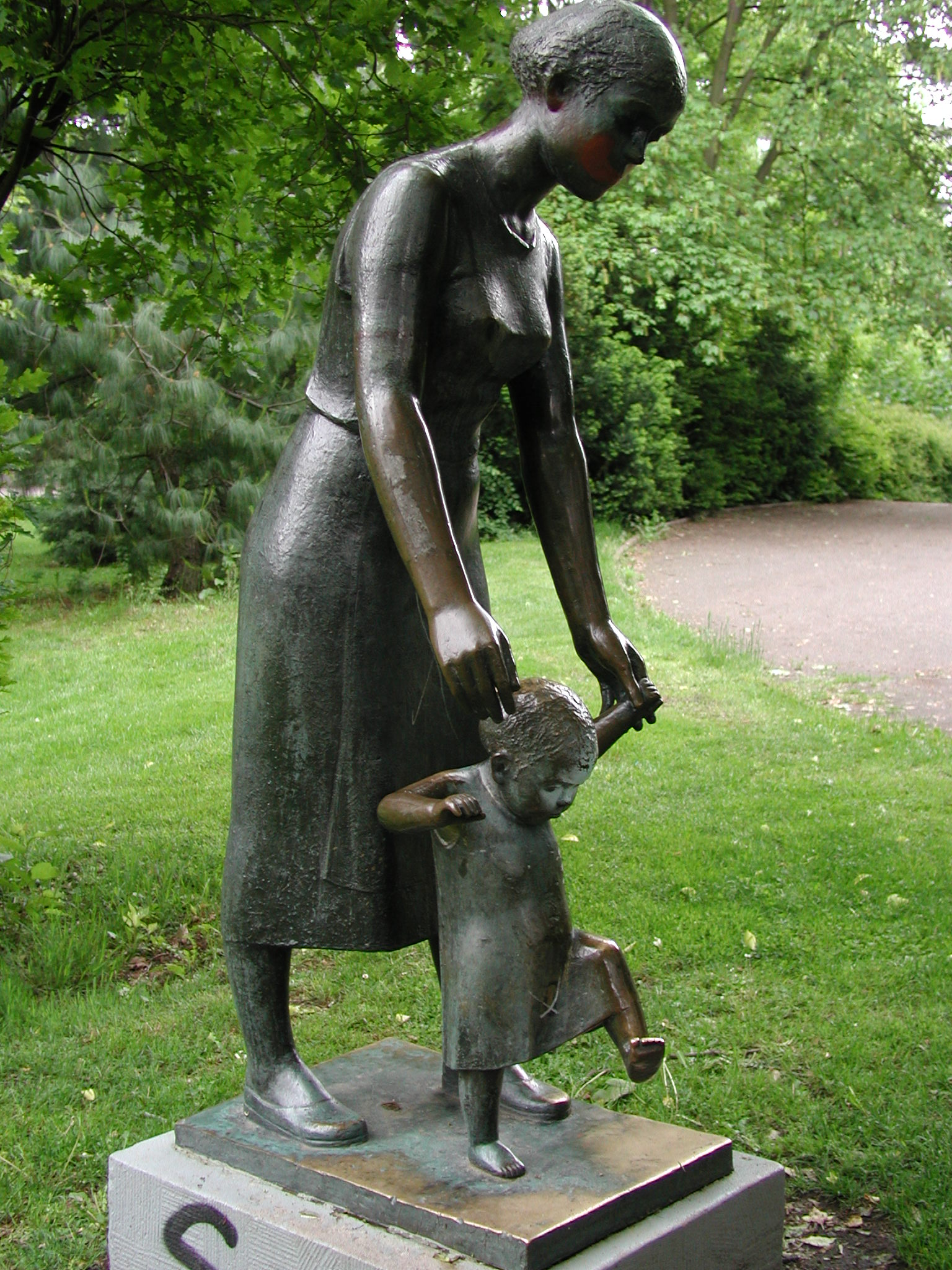 Bronzeskulptur: Walter Sutkowski: Mutter mit Kind im Stadtpark Lichtenberg